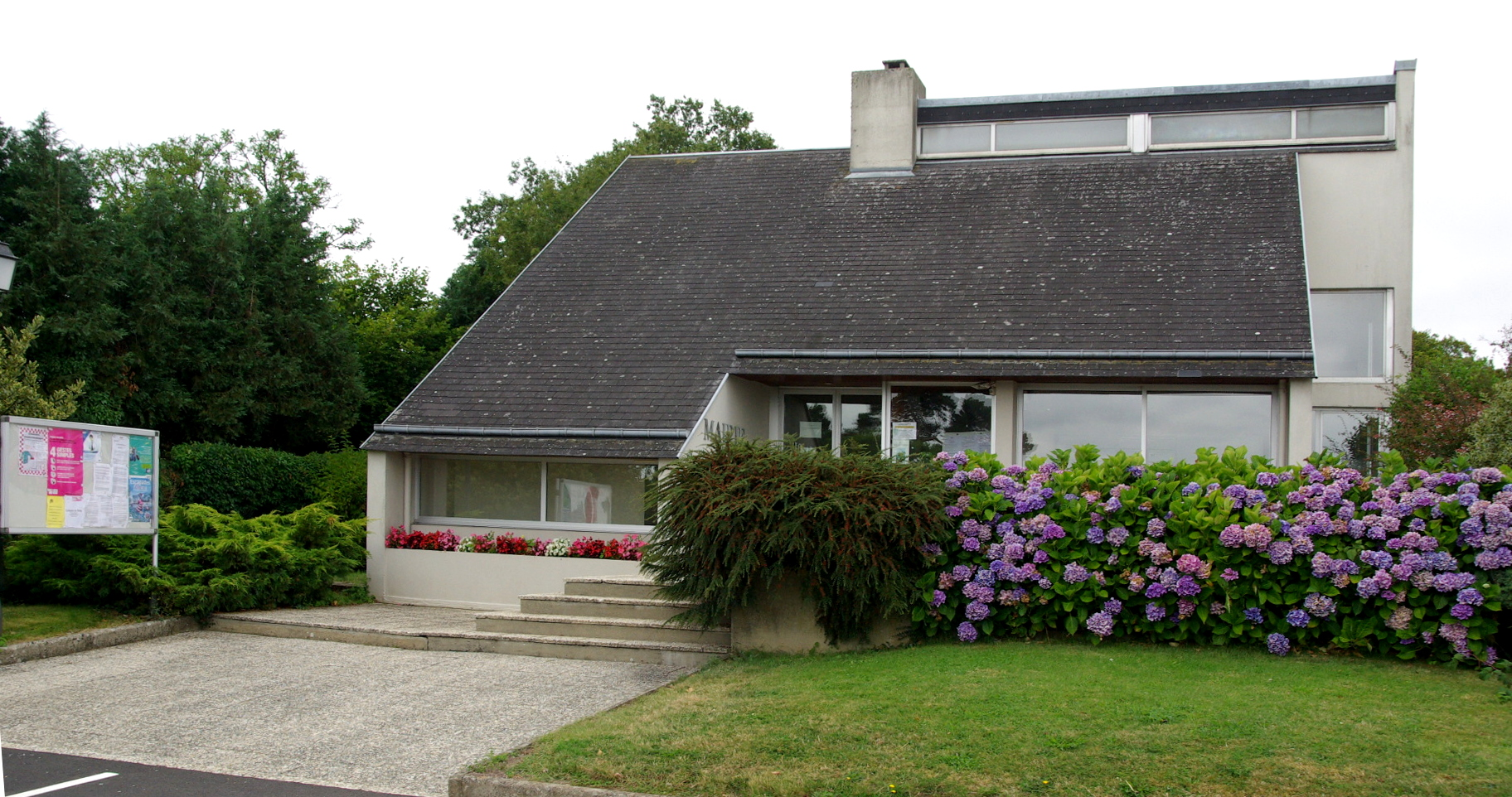 La mairie de La Villette, Calvados.